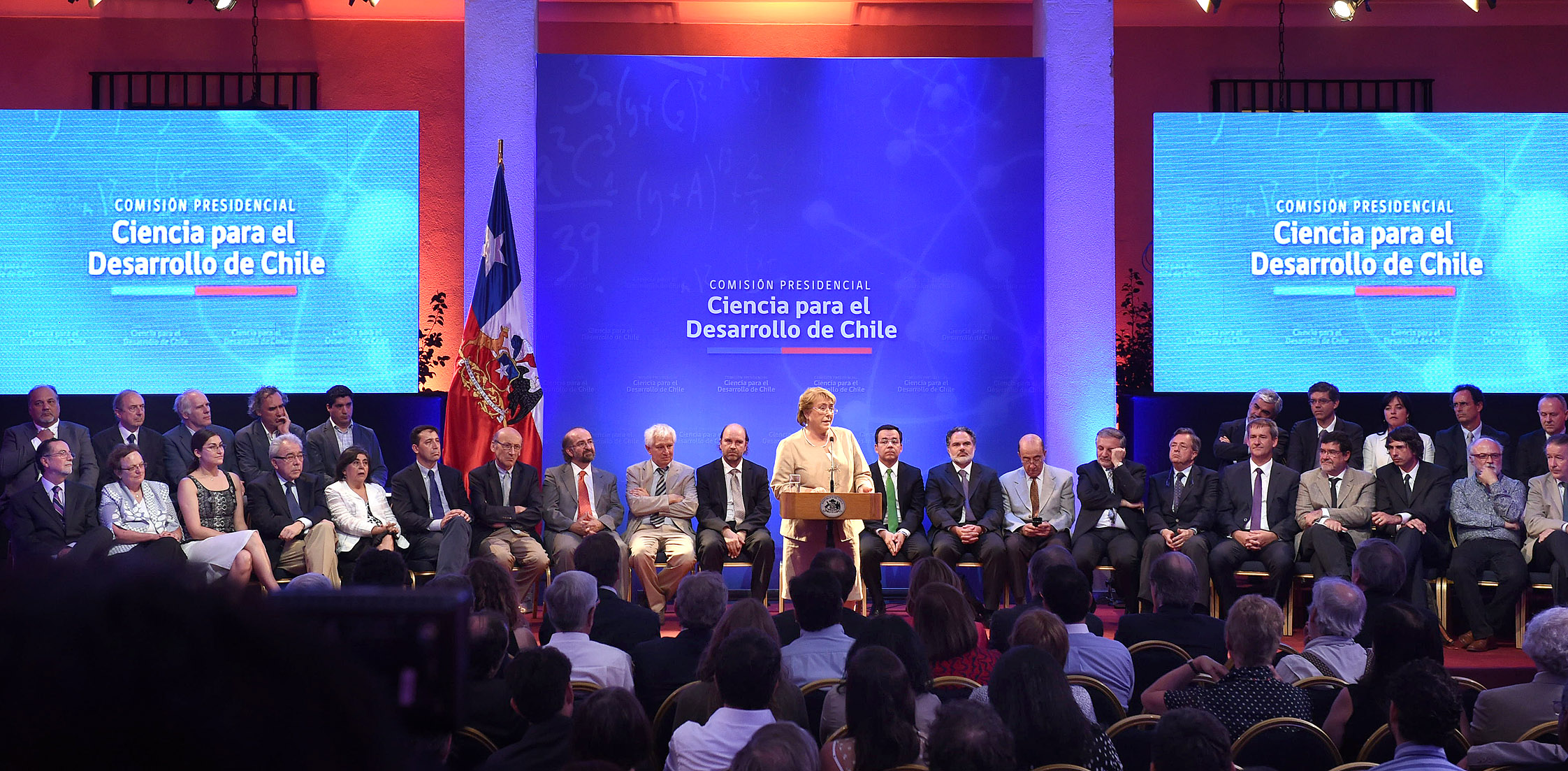 Gobierno de Chile